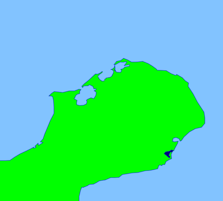 Mapa de la Bahia Cocinetas, peninsula de Guajira, Colombia